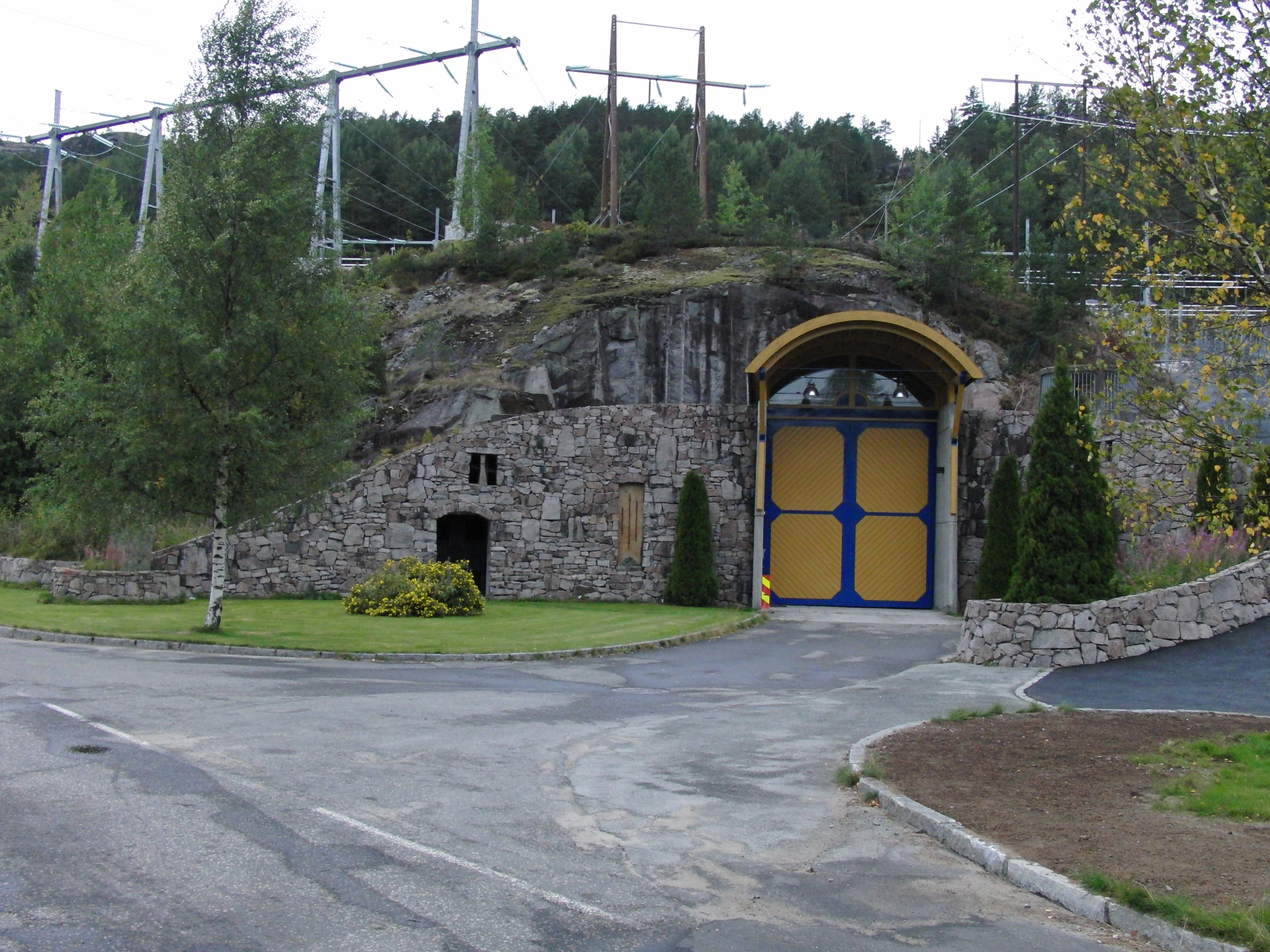 Skjerka kraftverk